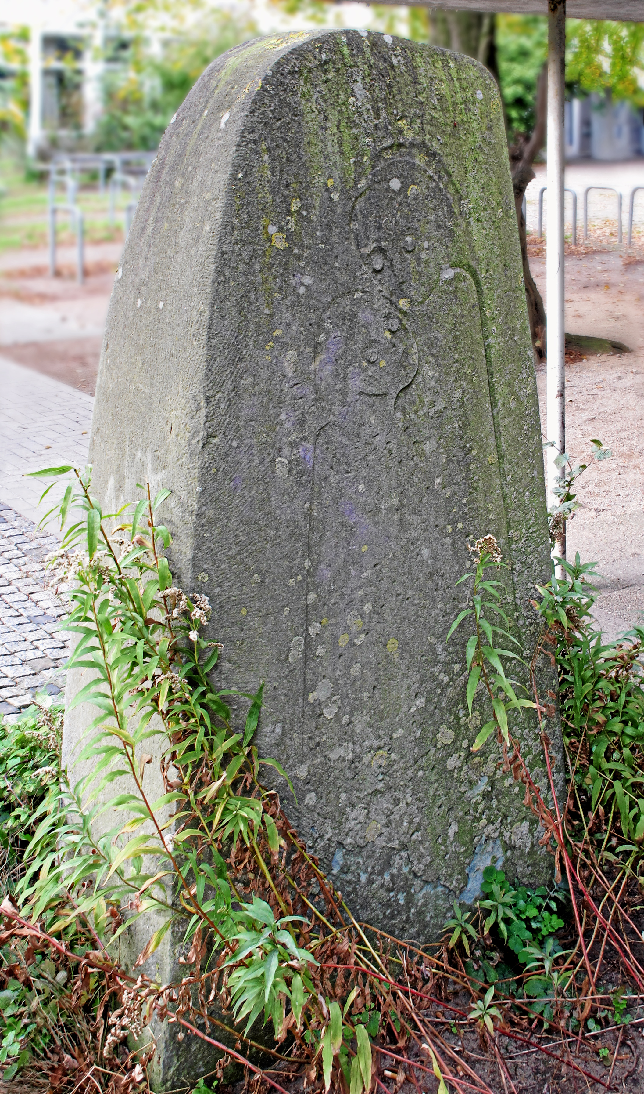 Denkmal Agnes Heineken (Rückseite) in Bremen, Das abgebildete Objekt ist ein geschütztes Kulturdenkmal in der Freien Hansestadt Bremen, mit der Nr. 0322,T001 beim Landesamt für Denkmalpflege registriert.